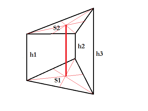 Prismoide retto a basi oblique